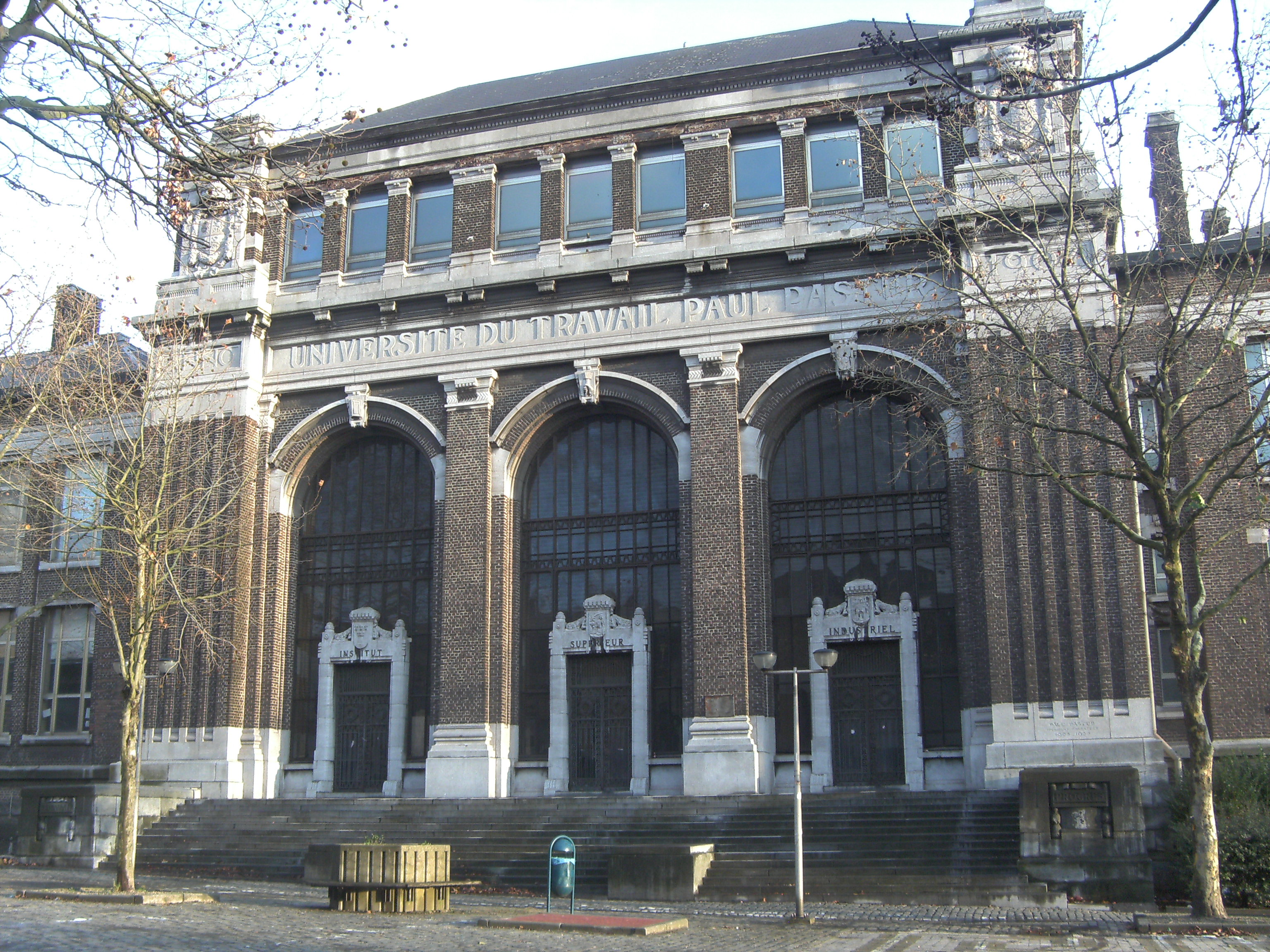 Charleroi (Belgique) - Boulevard Solvay, bâtiment Gramme de l' Université du Travail Paul Pastur. Portail d'entrée.